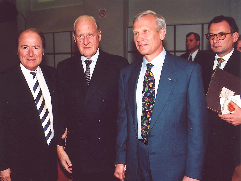 Международная Леонардо-премия